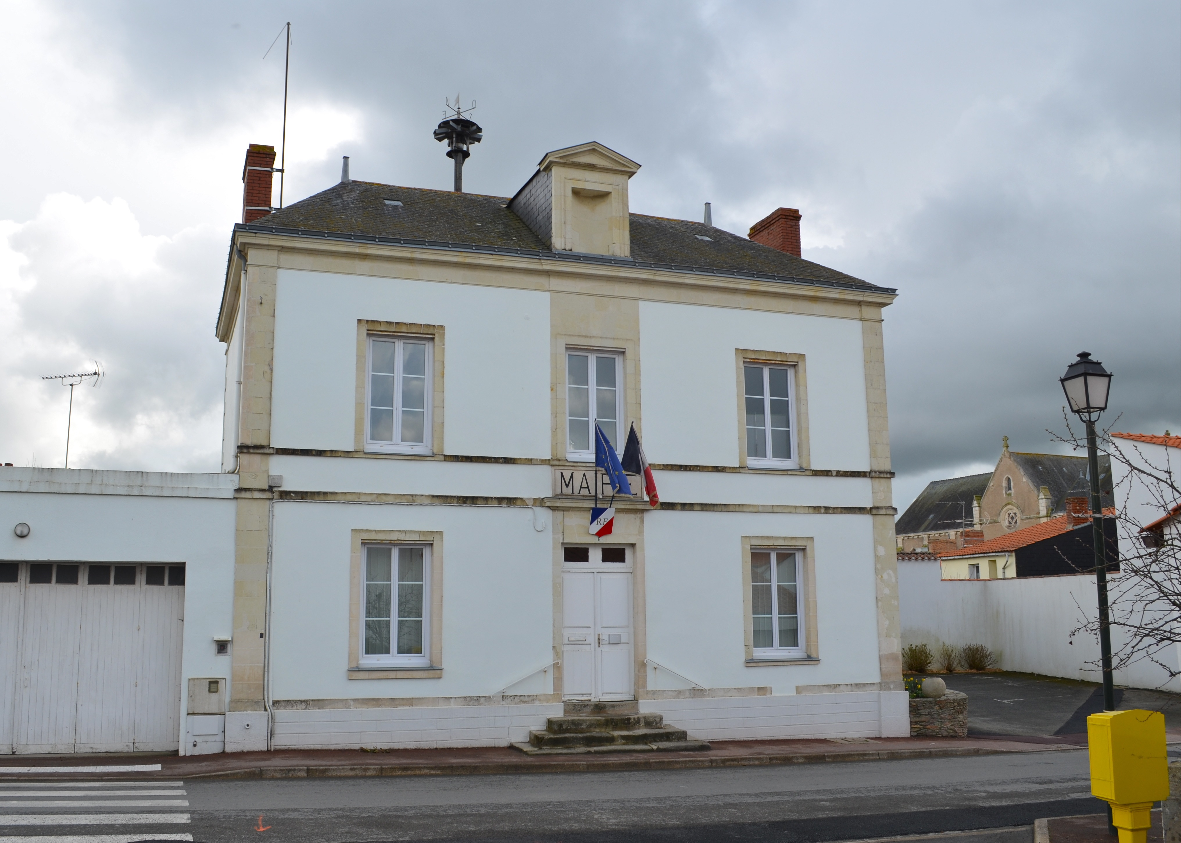 Mairie de Saint-Étienne-de-Mer-Morte - Loire-Atlantique